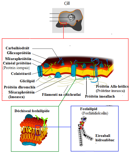 Irish Gaelic language version of English original.